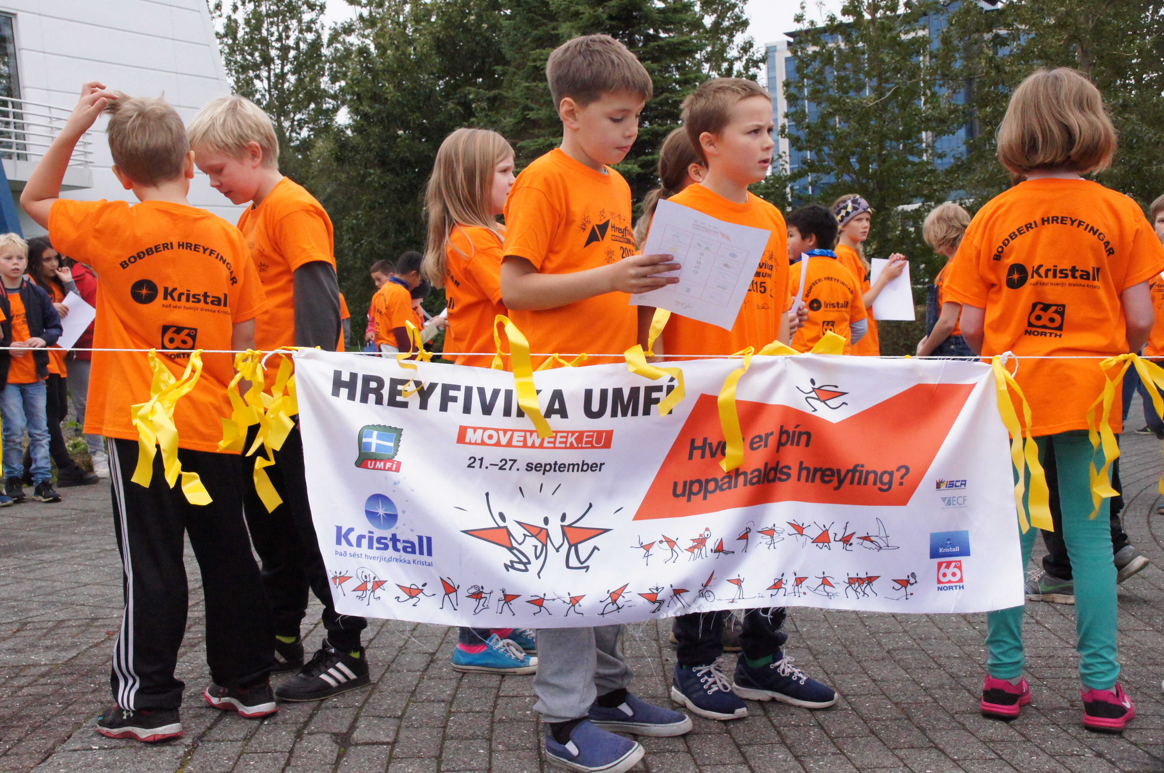 Börn við setningu Hreyfiviku UMFÍ.